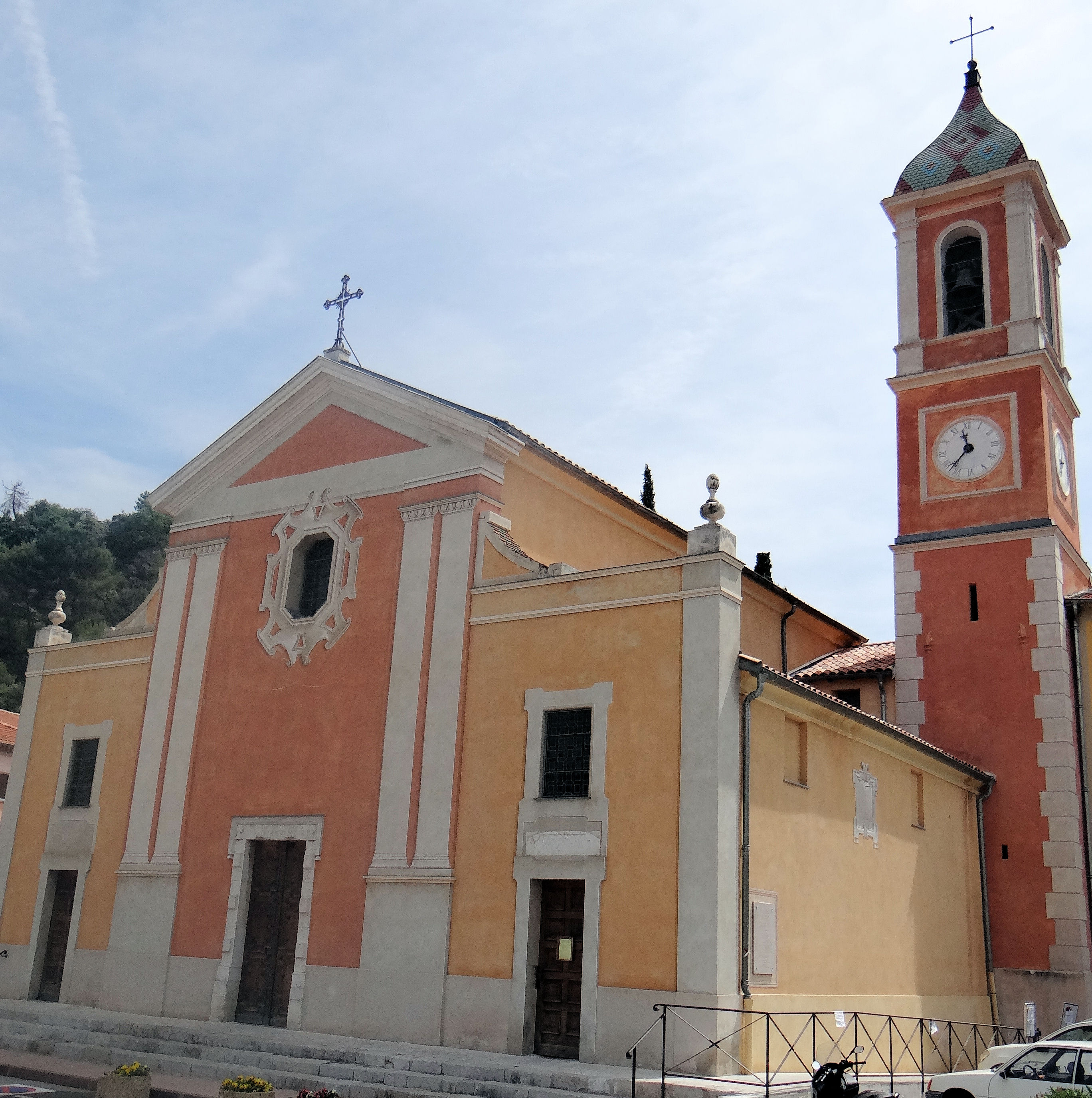 Tourrette-Levens - Église Sainte-Rosalie - Façade ouest